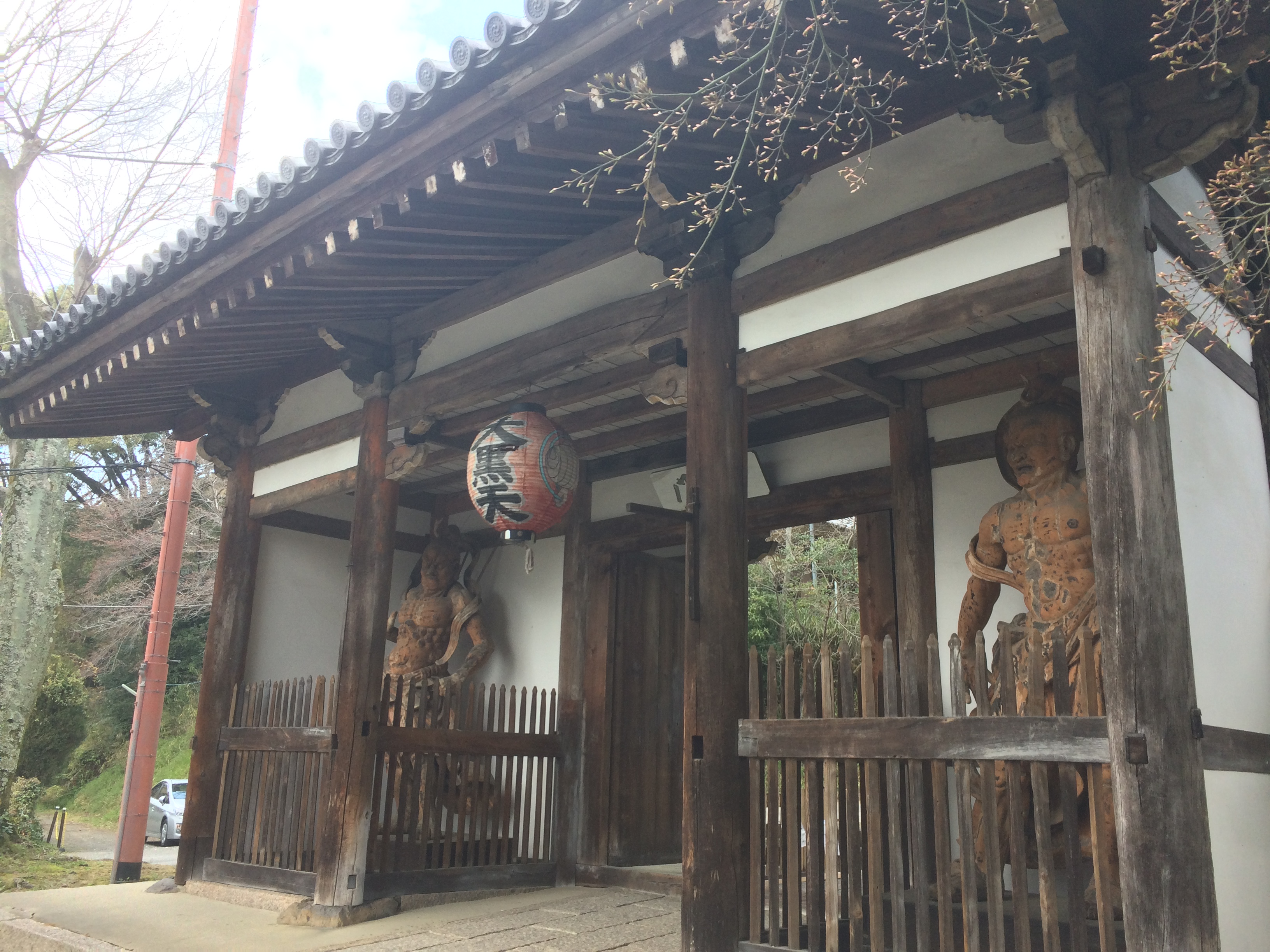 大山崎町の宝積寺